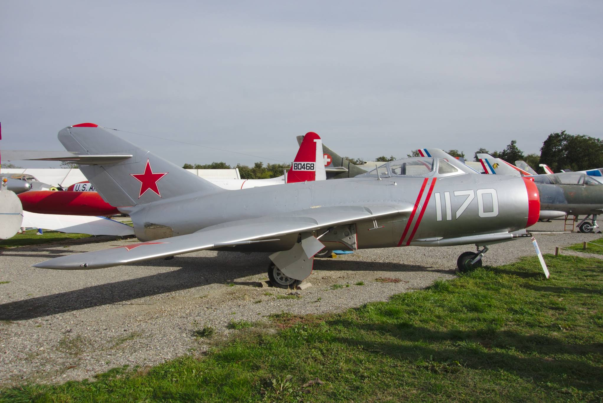 Mikoyan-Gourevitch MiG-15 au musée des ailes anciennes à Toulouse (France)